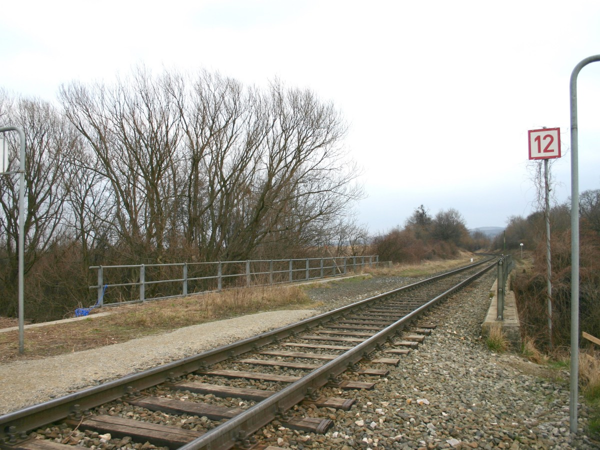 Mattersburger Bahn - Grenzbrücke in Loipersbach-Schattendorf.